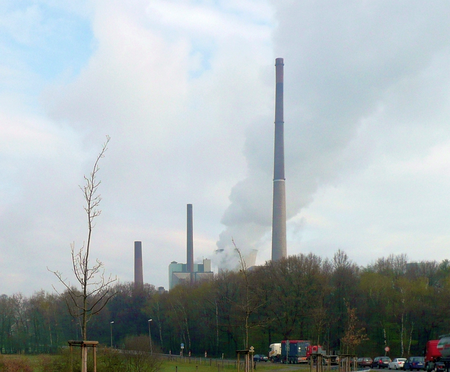 Kraftwerk Lünen von Süden aus gesehen